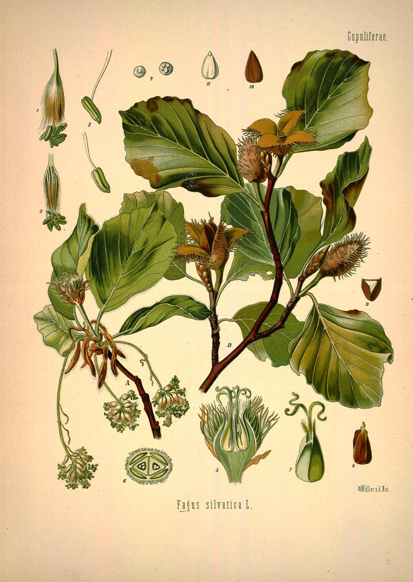 Rotbuche. A blühender und B fruchtender Zweig, natürl. Grösse; 1 männliche Blüthe mit Kelch, vergrössert; 2 dieselbe ohne Kelch, desgl.; 3 Staubgefässe, desgl.; 4 Pollen, desgl.; 5 weibliche Blüthe im Längsschnitt, desgl.; 6 dieselbe im Querschnitt, desgl.; 7 Fruchtknoten, desgl.; 8 Frucht, natürl. Grösse; 9 dieselbe im Querschnitt, desgl.; 10 Same mit Hülle, desgl.; 11 derselbe ohne Hülle, desgl.